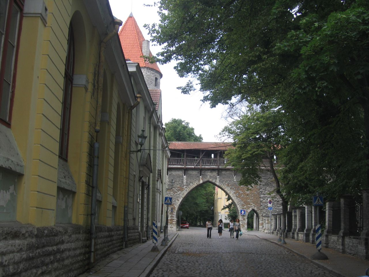 Suur-Kloostri tänav Tallinnas.